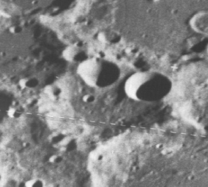 Cráter lunar Langley. (Imagen Lunar Orbiter 5)